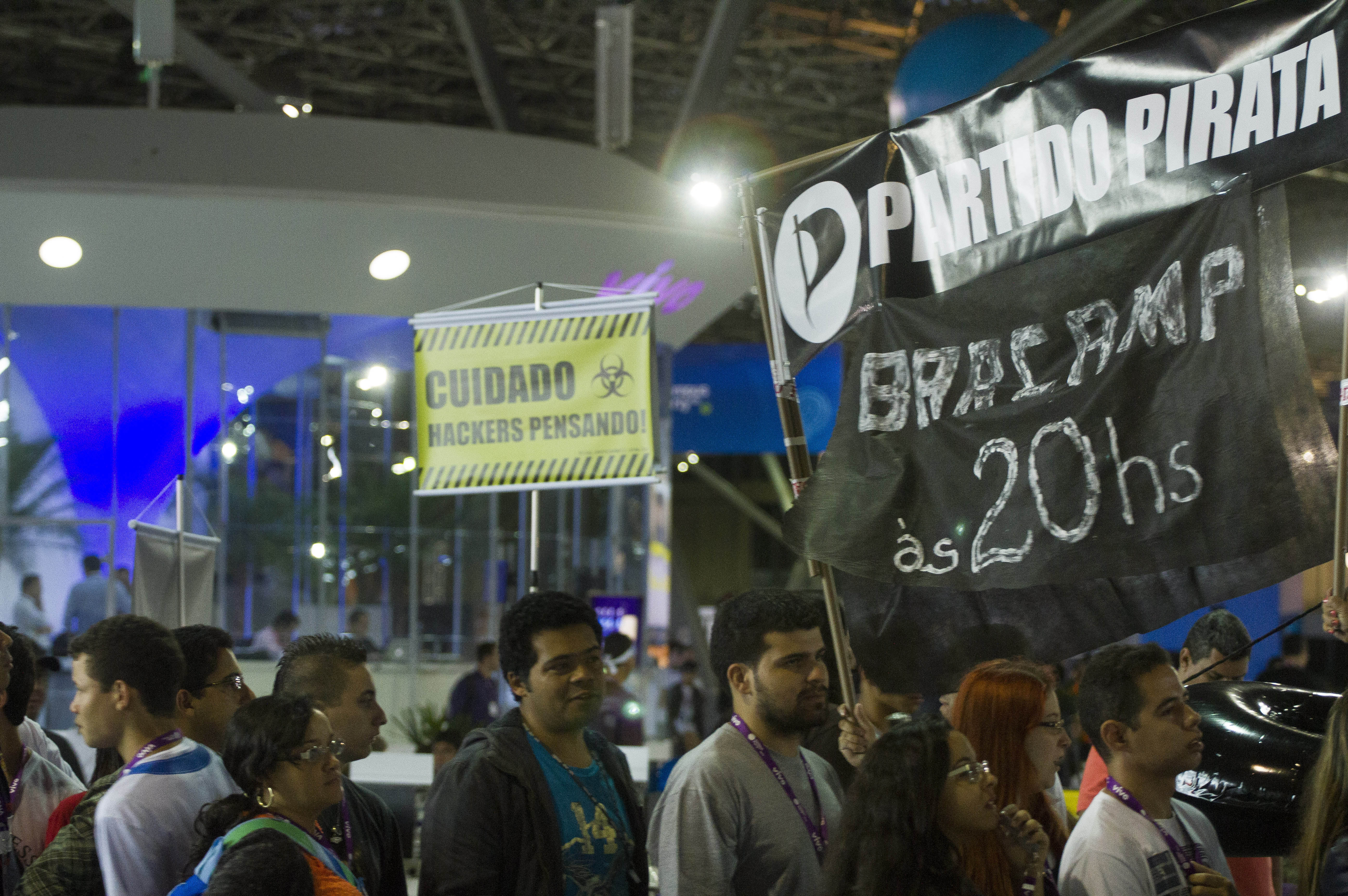 Partido Pirata na Campus Party Brasil 2013, 29/01/2013 - Foto: Cristiano Sant'Anna/indicefoto